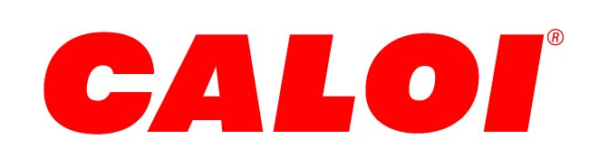 Logo Oficial Caloi